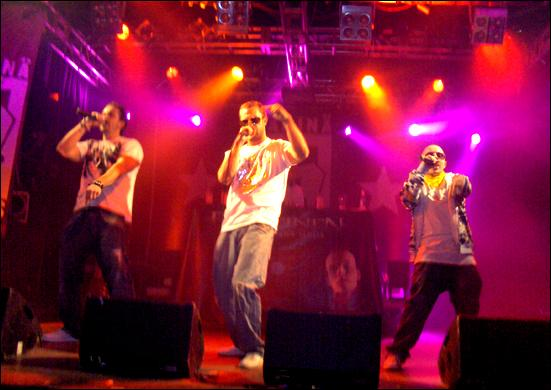 (vas-oik. Tasis, Andu, Uniikki) Kapasiteettiyksikkö Rähinä Live 06:ssa, Nosturissa